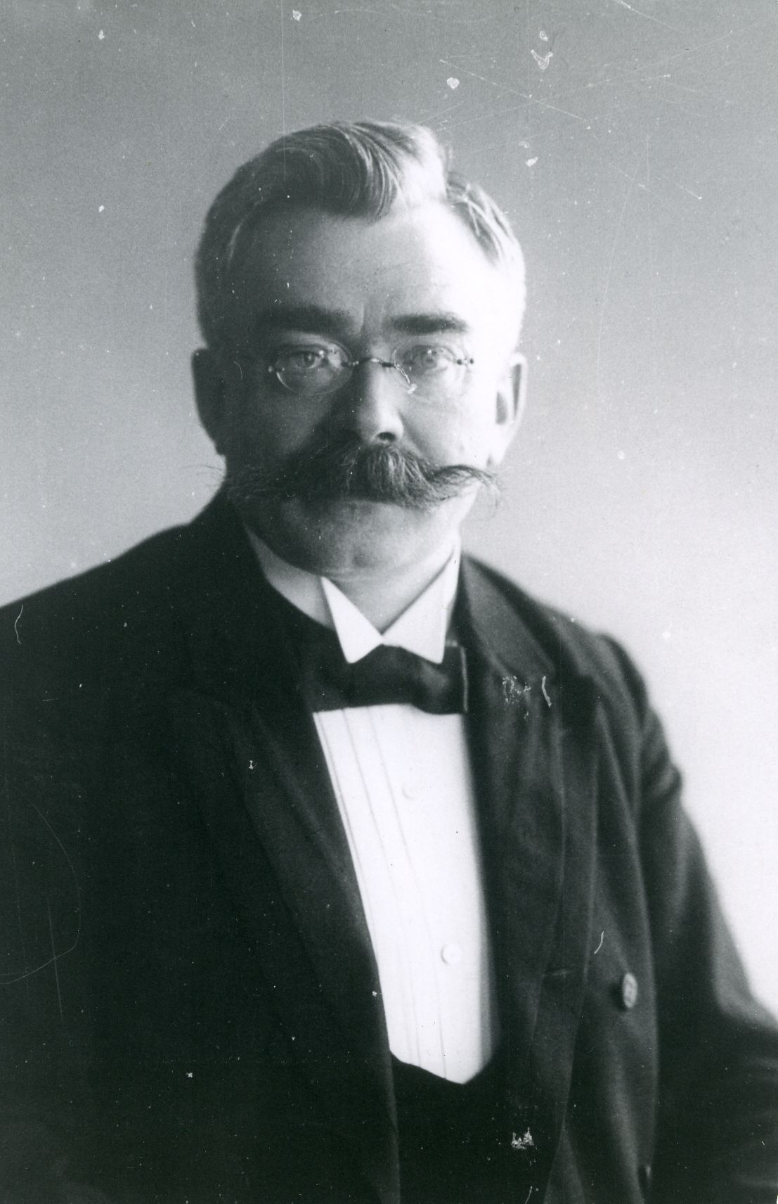 Paul Wendland (1864–1915), deutscher klassischer Philologe